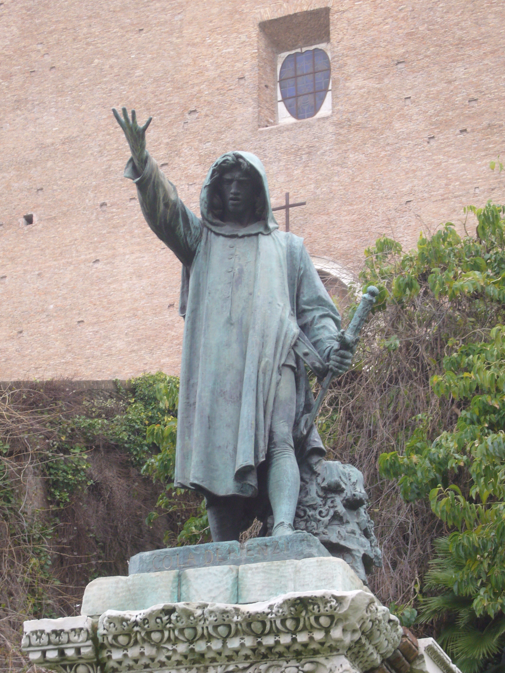 Roma, monumento a Cola di Rienzo alla Cordonata di Campidoglio